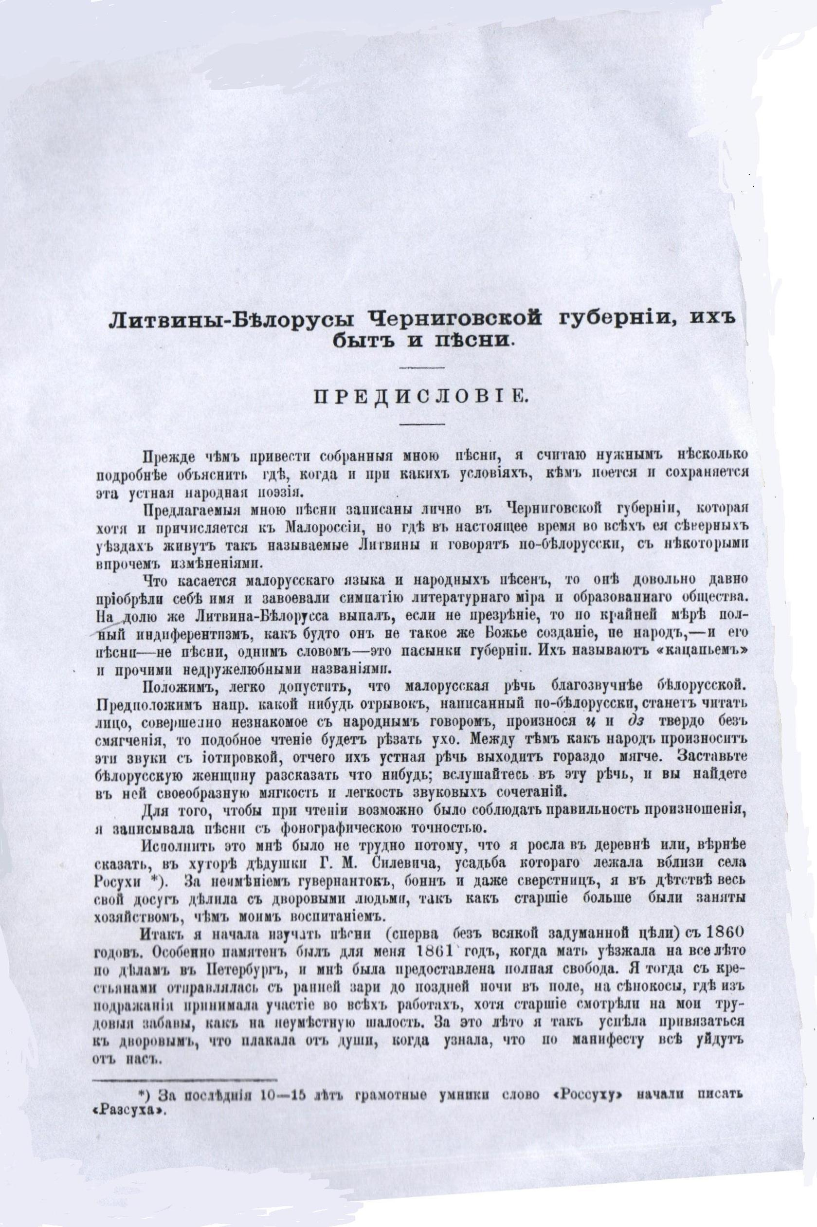 першая старонка працы Косіч «Ліцвіны-беларусы Чарнігаўскай губерні, іх побыт і песні»